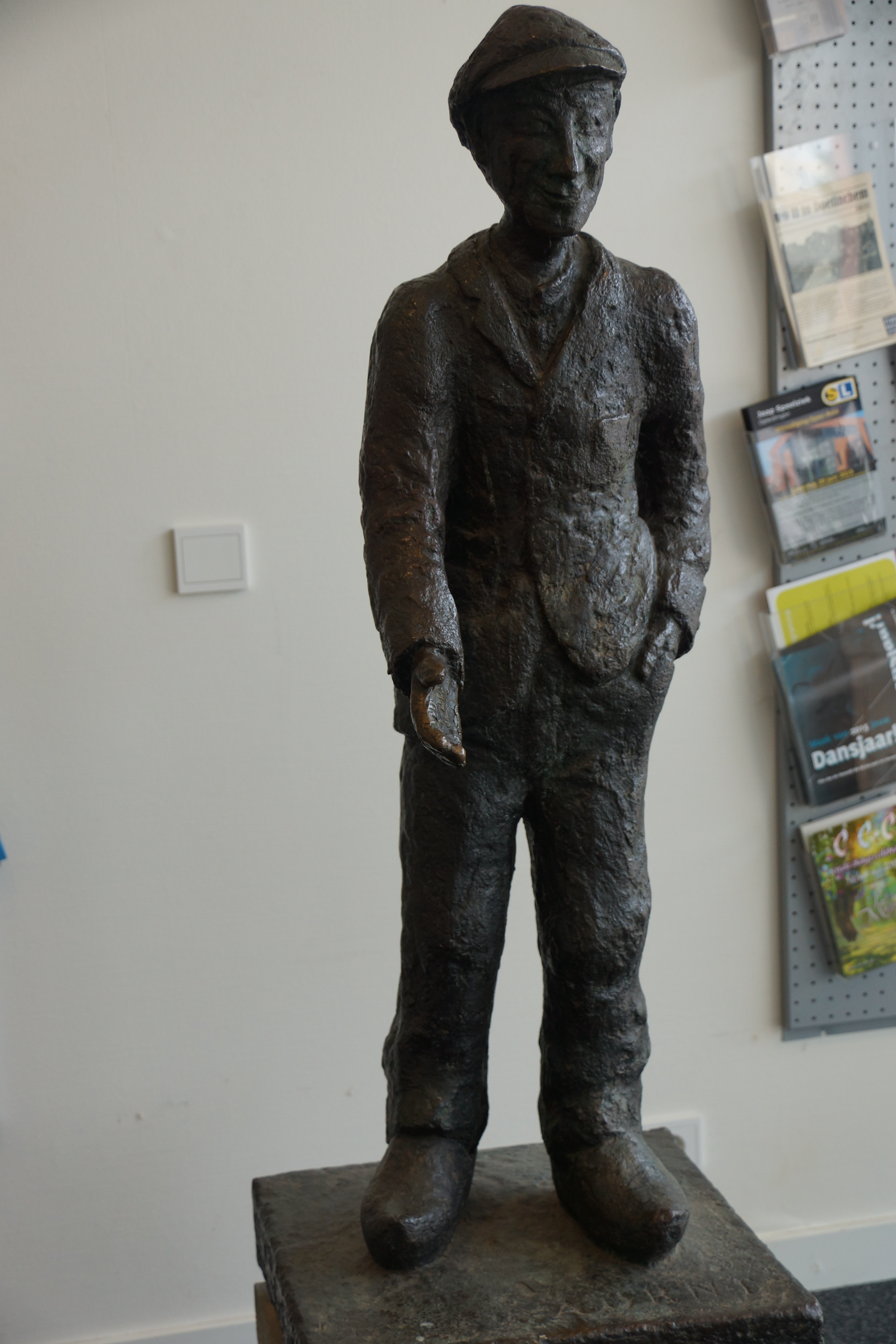 Aornt Peppelenkamp 150617 (2)